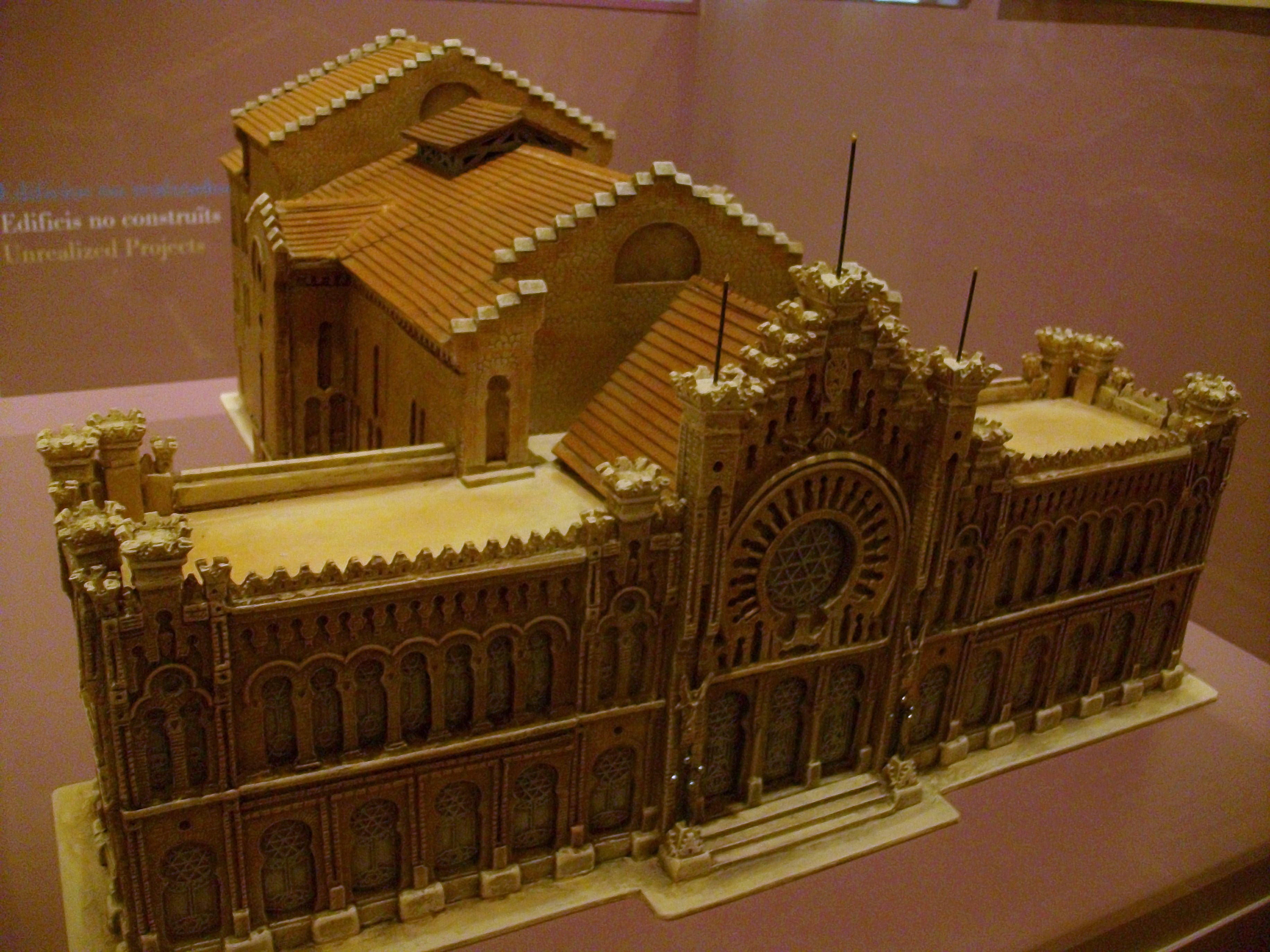 Maqueta del projecte de Cortina (no exectutat) per al Teatre Chapí de Villena.